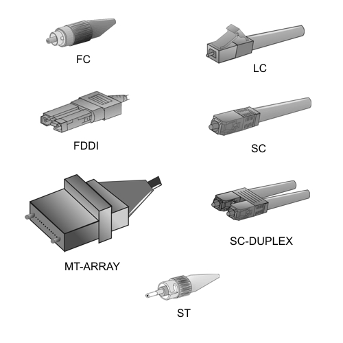 Tipos de conectores de la fibra óptica La Fibras opticas LC son utlizadas en router el cual tiene que tener un gbic